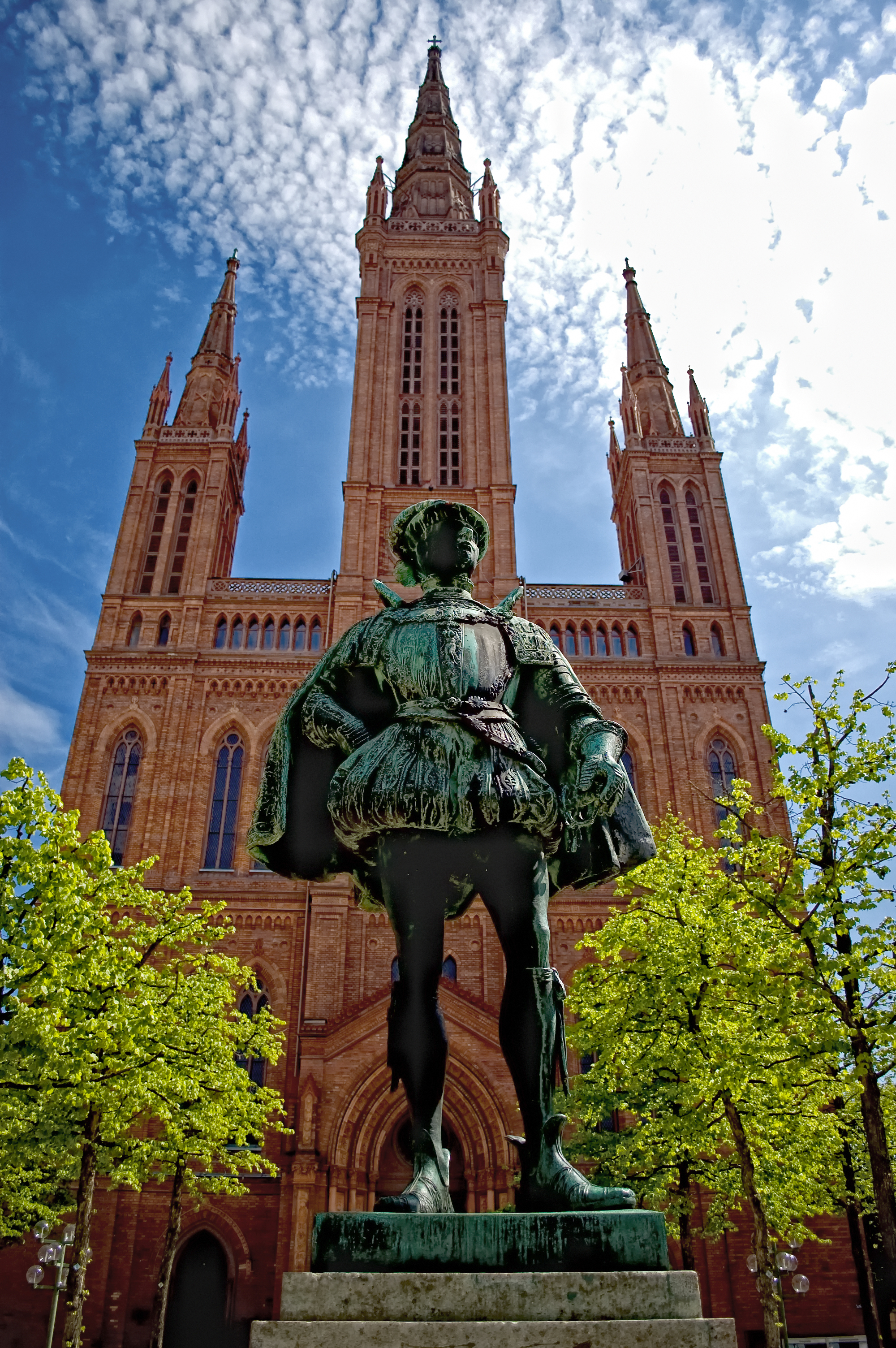 Denkmal "Der Schweiger" vor der ev. Marktkirche in Wiesbaden